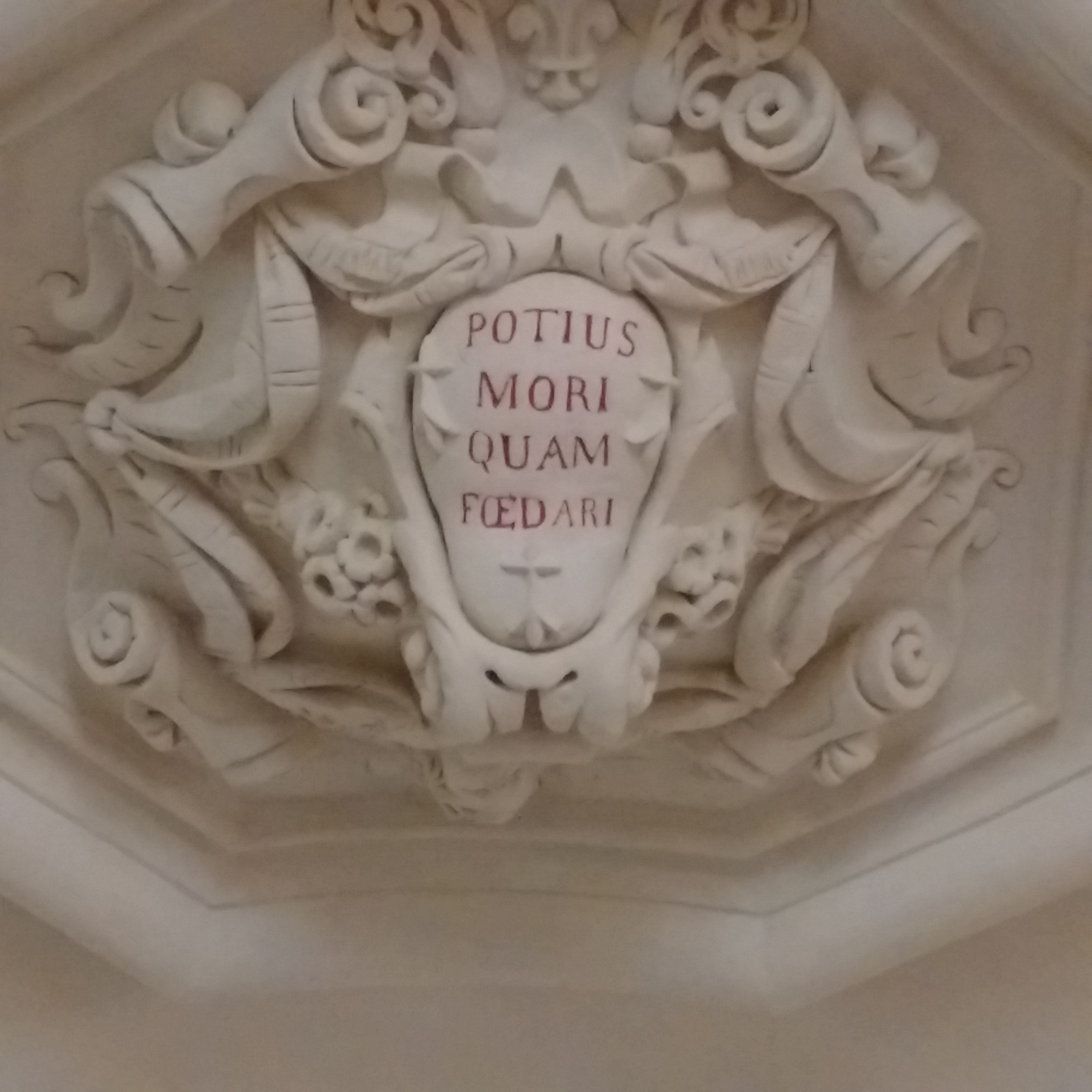 Ur sell war toenn chapel sant Salver e Lise Sant Salver e Redon. Enskrivadur broadelour breton o reiñ meul da Vreizh.